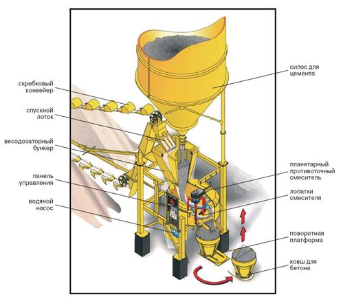 Описание БРУ